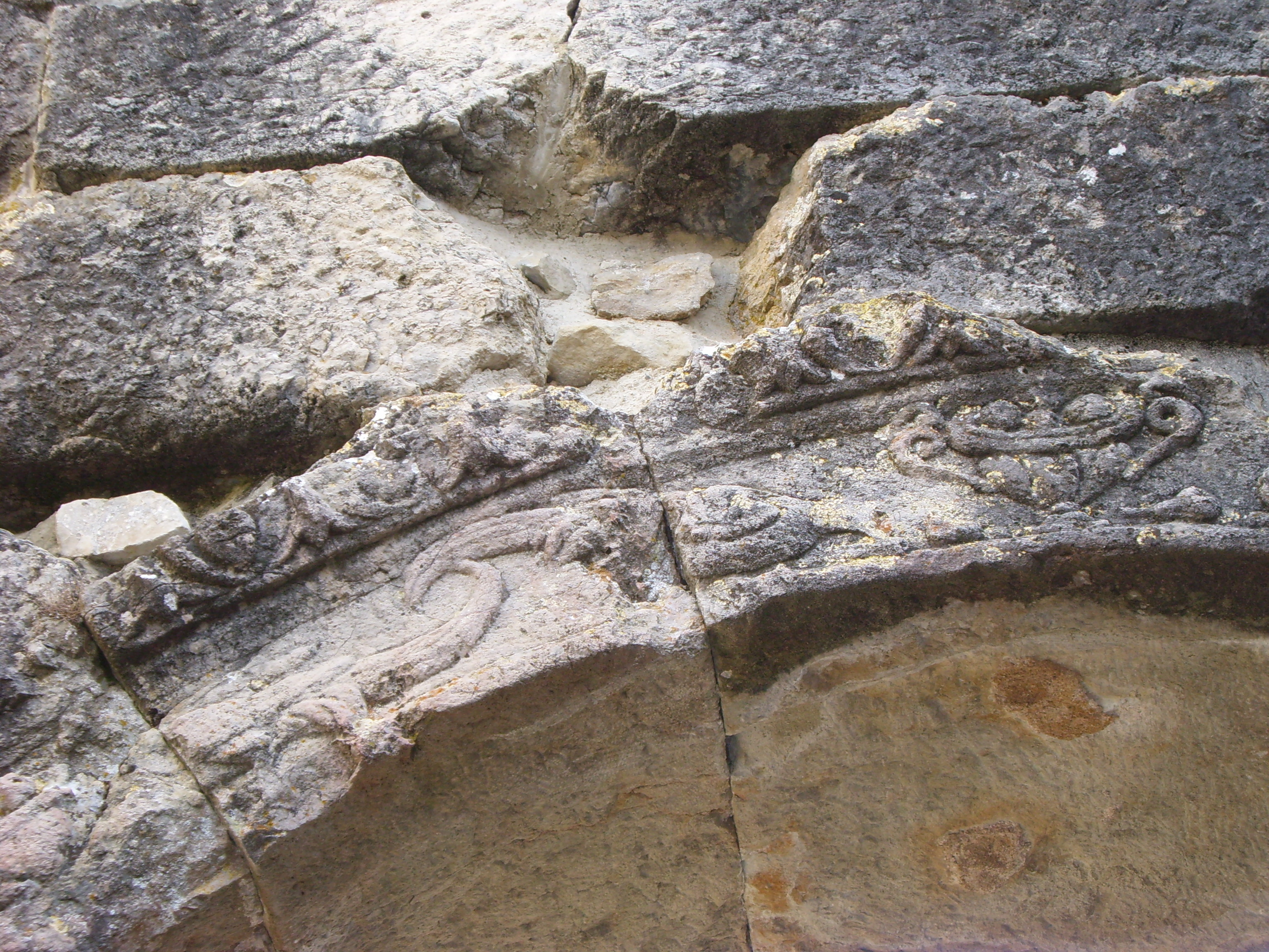 Mausolée de Lanuéjols (Lozère) : détail de l'archivolte de l'arc de la cella